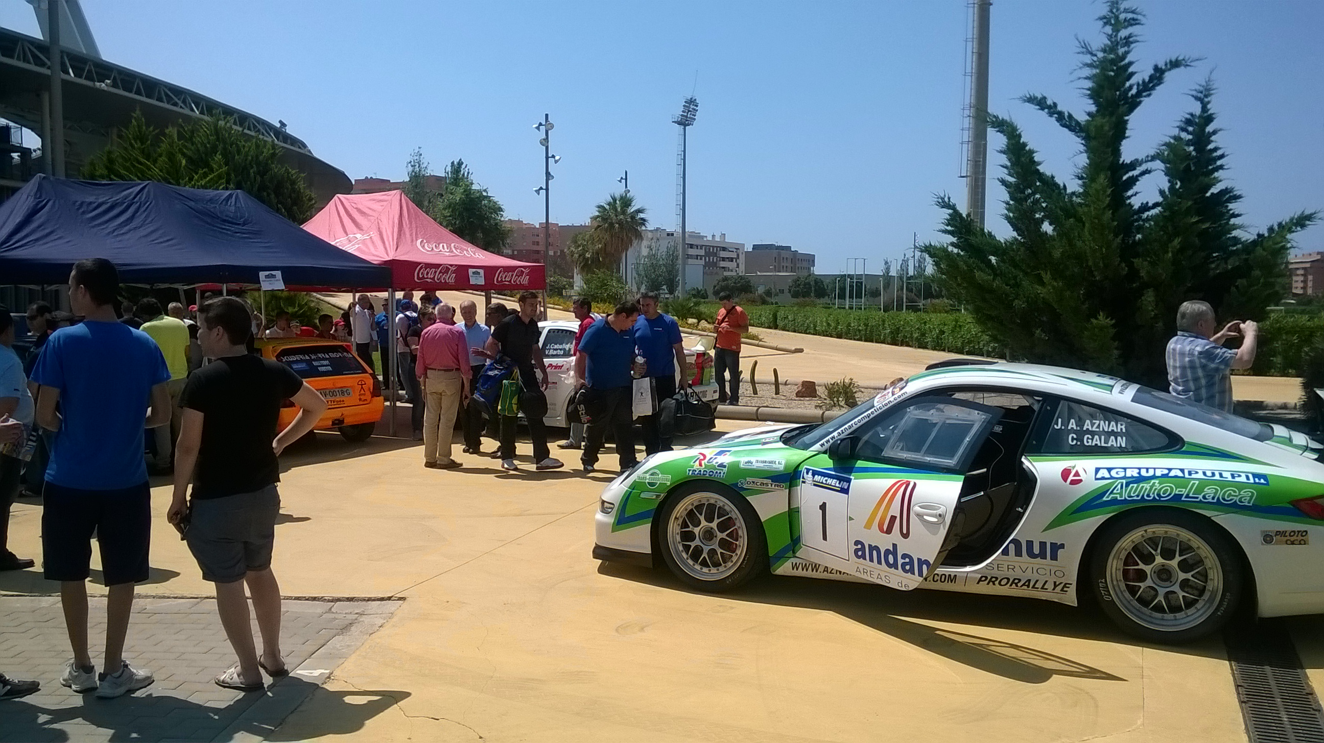 41 Rally Costa de Almería